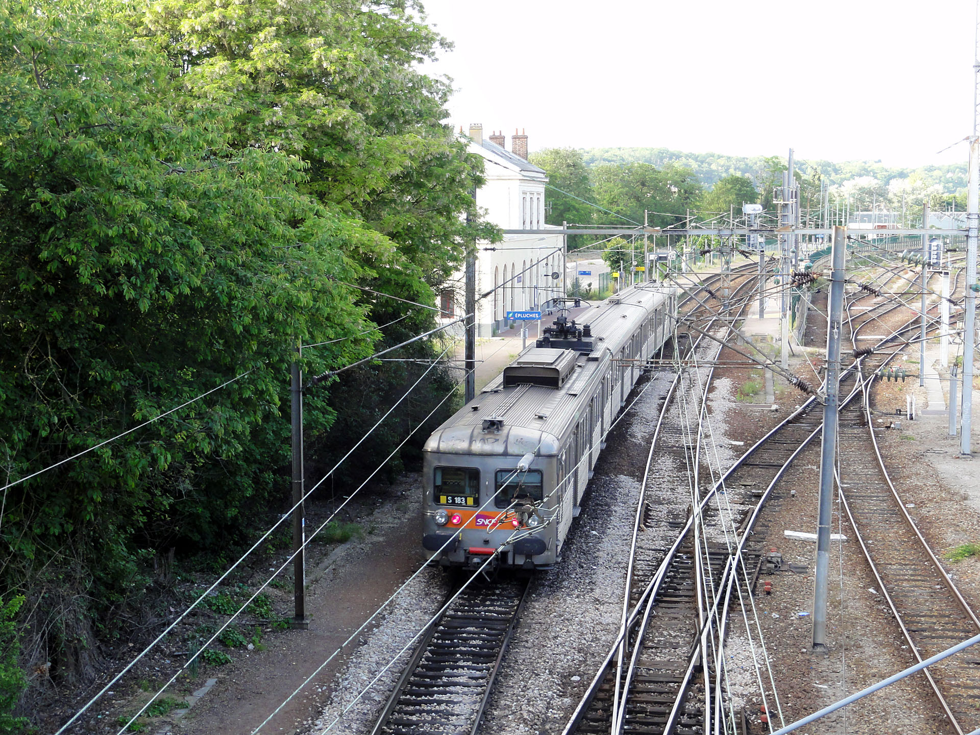 La gare d'Épluches à Saint-Ouen-l'Aumône, Val-d'Oise, France.